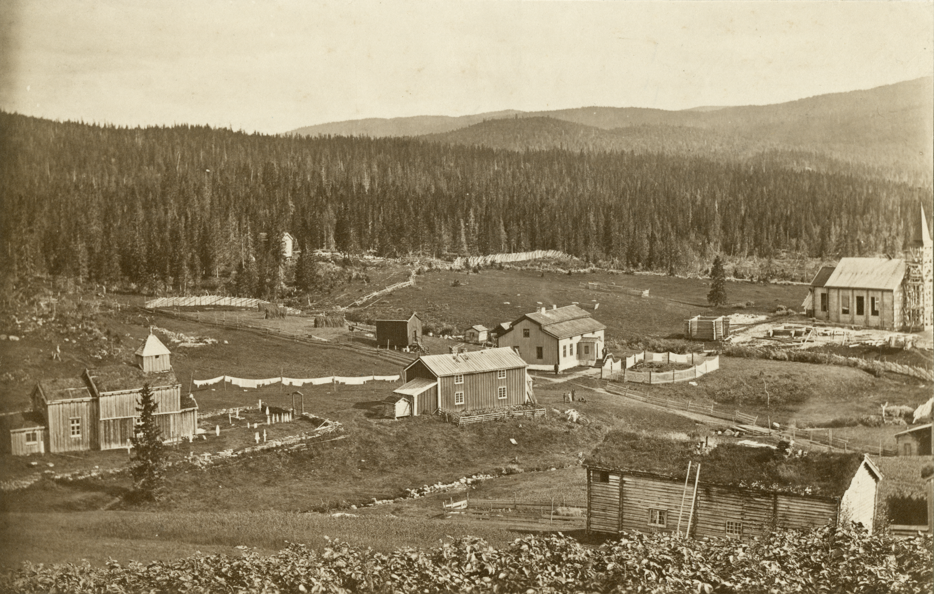 Hattfjelldal kirke i Hattfjelldal, Nordland Den gamle kirken til venstre ble revet i 1874. Den nye kirken t.v. ble inviet i 1869. This image on crowdsourcing geotagging platform Fotodugnad